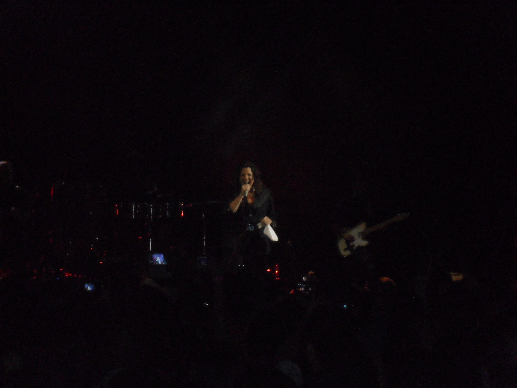 A cantora Ana Carolina durante um show da Turnê Sucessos na Fundição Progresso, Rio de Janeiro.